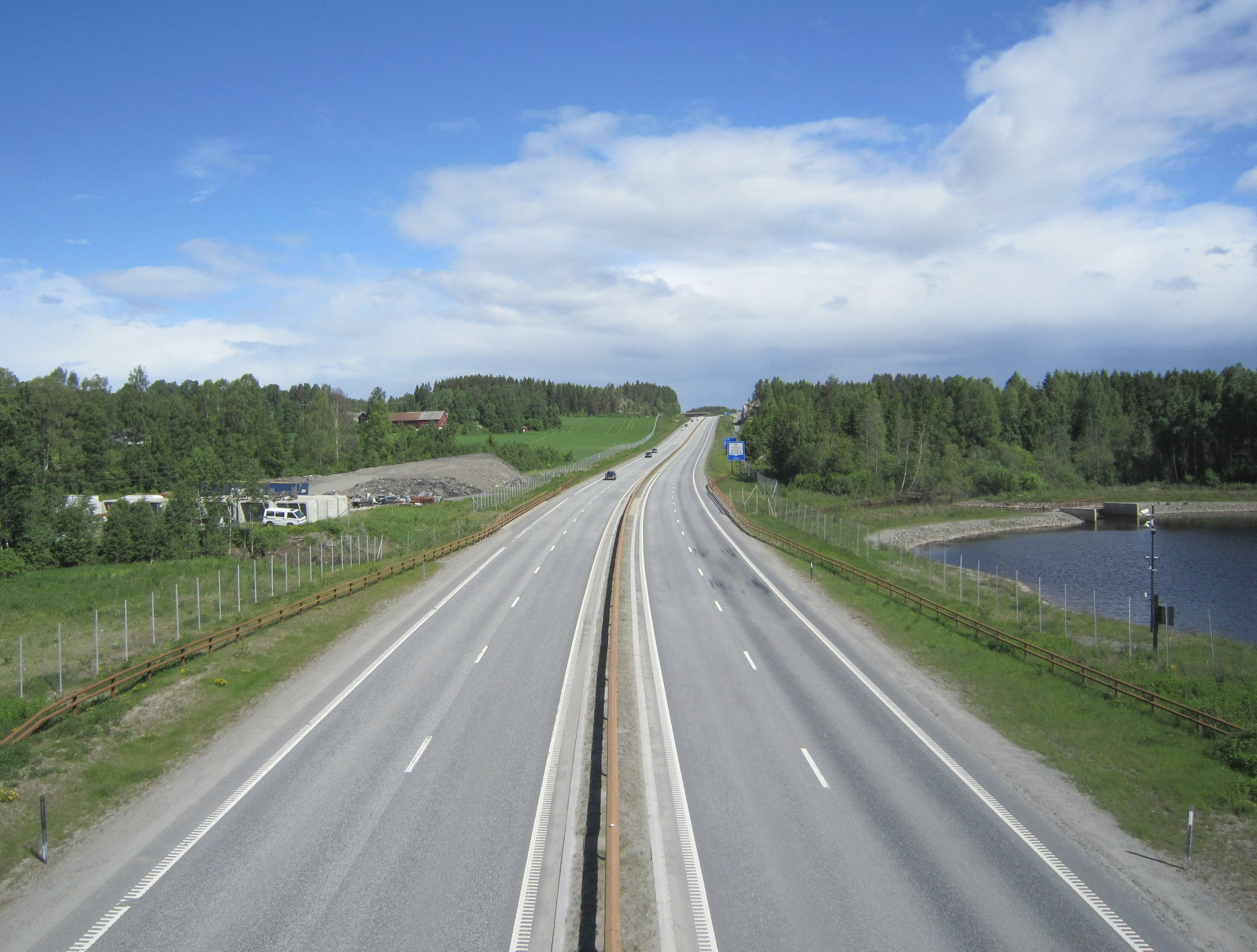 E6 nord for fylkesvei 224